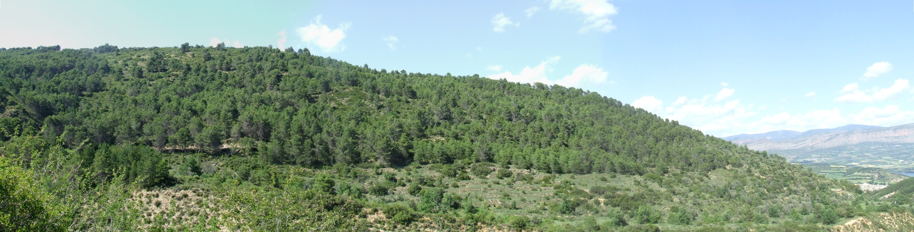 Muntanya de Sant Pere Màrtir (Salàs de Pallars, Pallars Jussà)